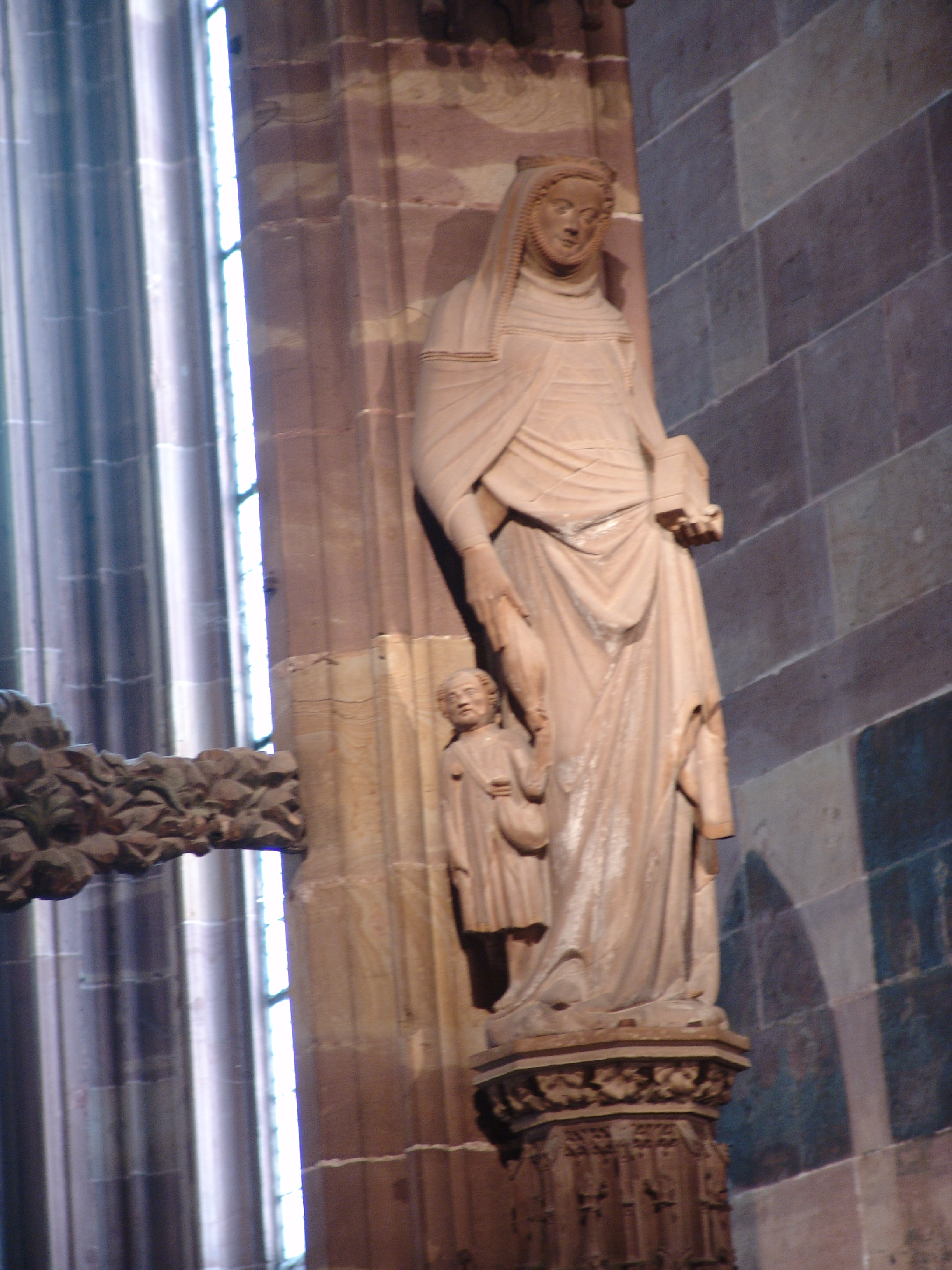 Cathédrale Notre-Damecathédrale